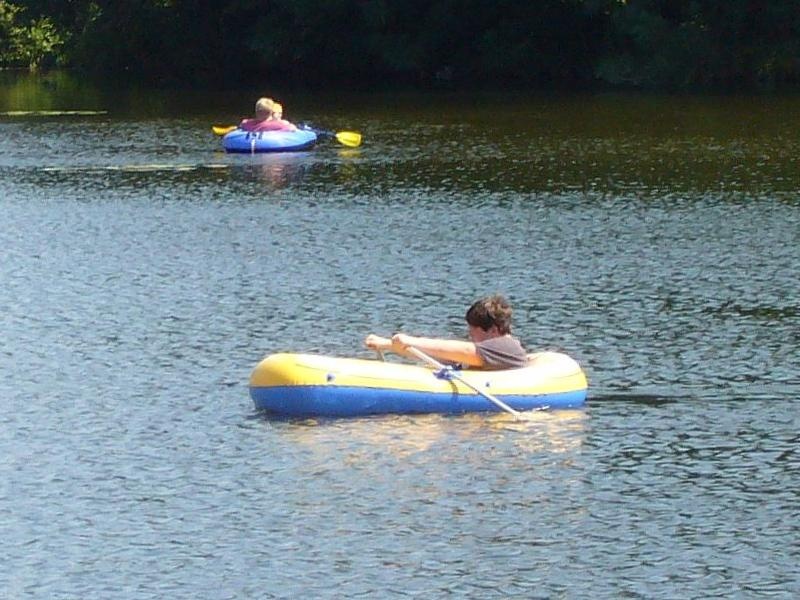 Spelevaren in opblaasboten. Eigen foto Caseman juli 2006